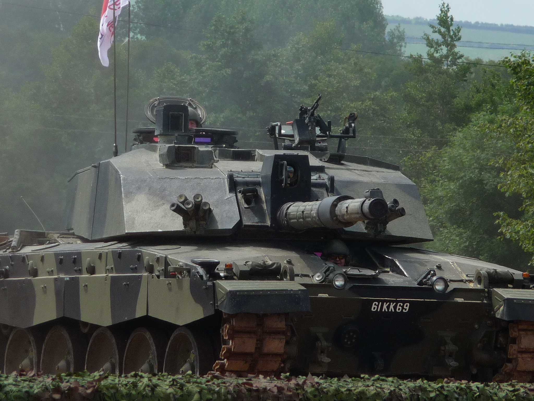 Challenger II at Tankfest 2009